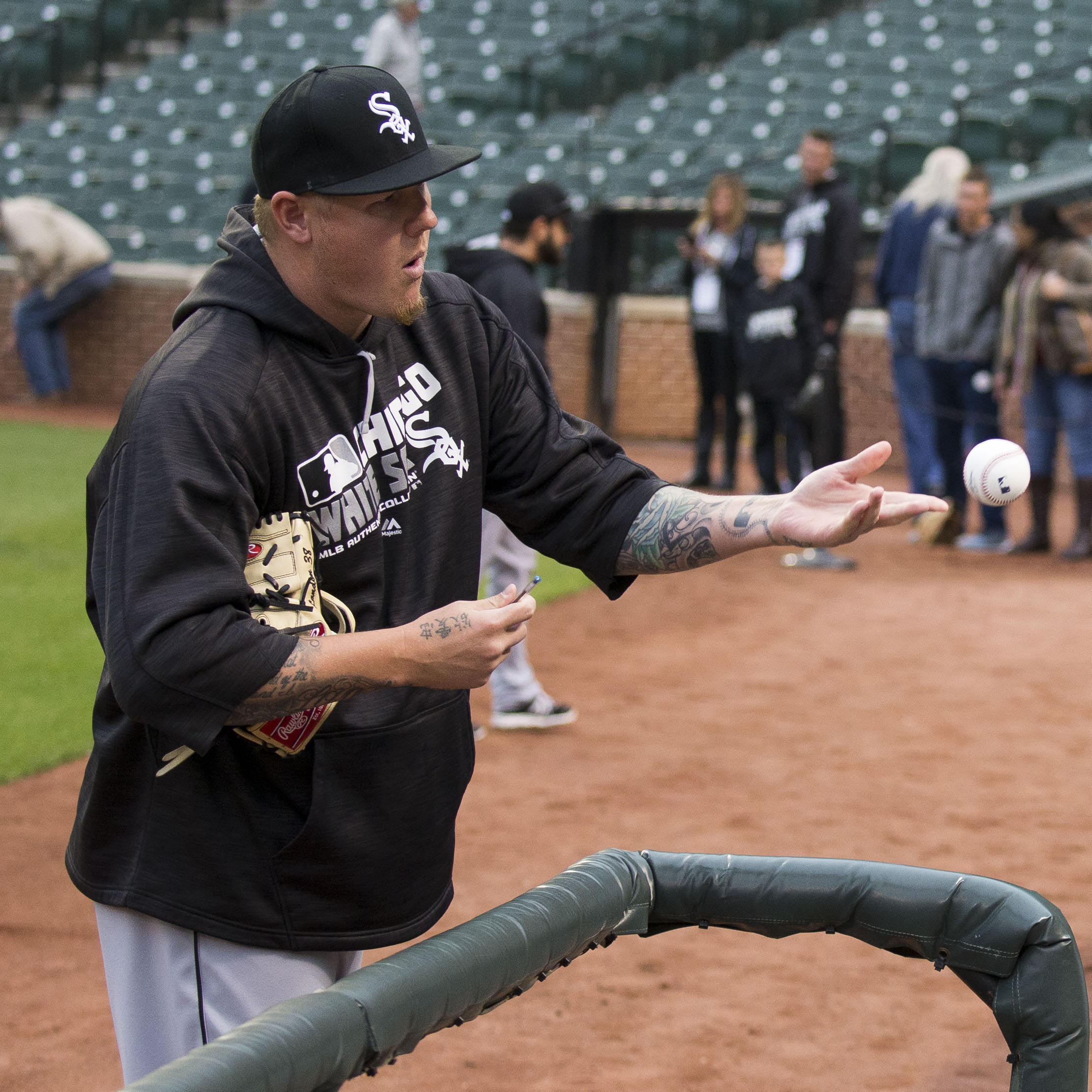 Mat Latos